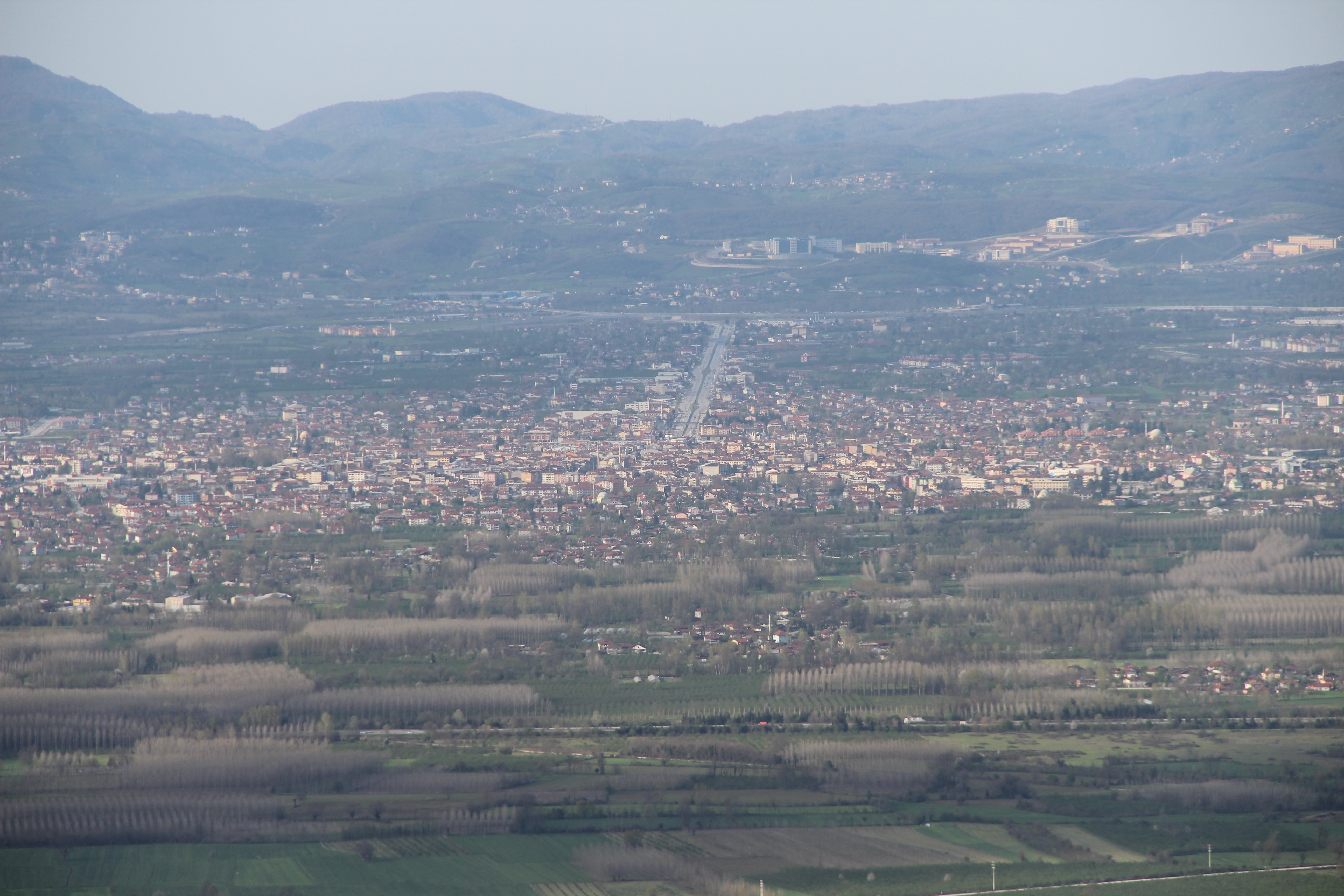 Düzce